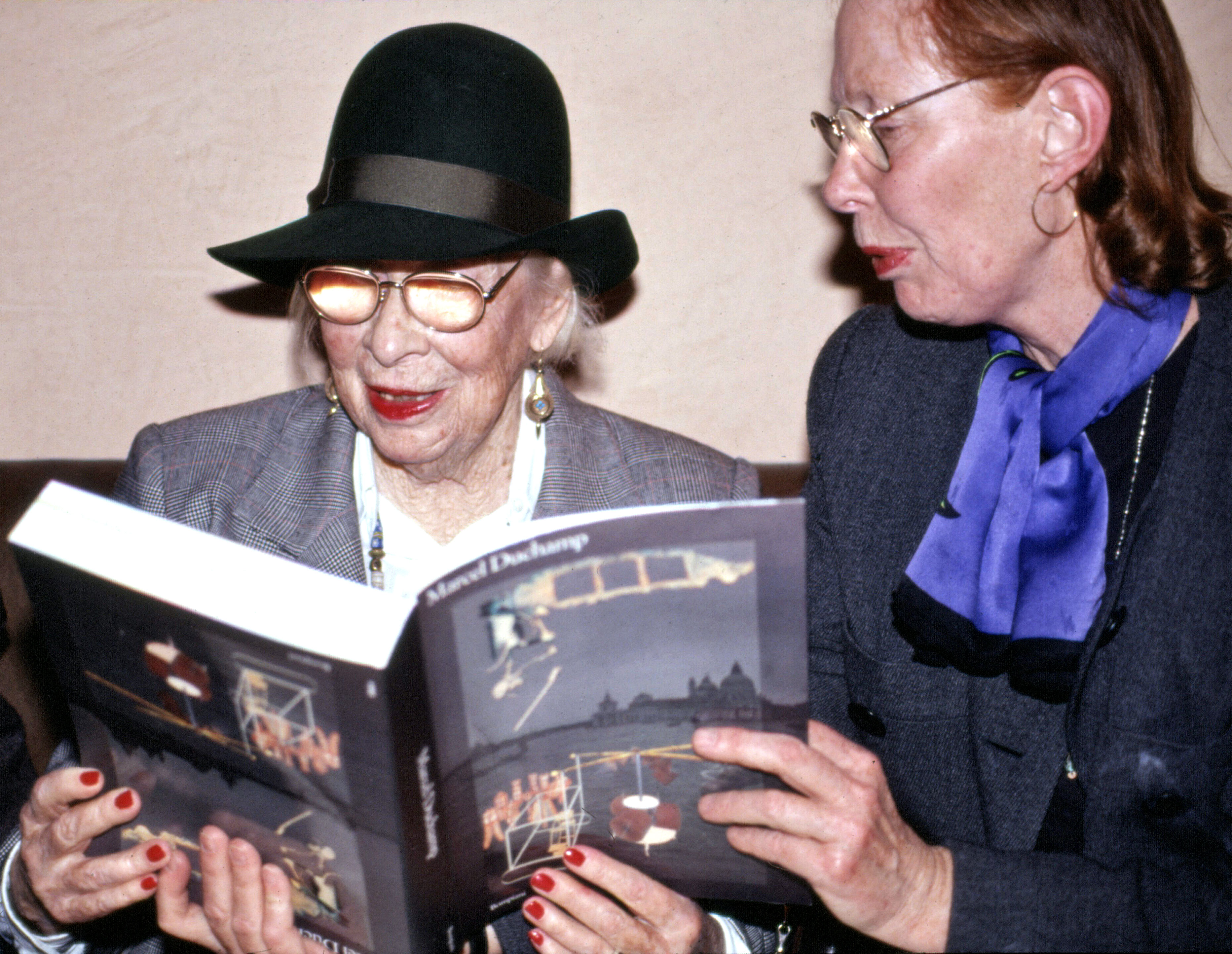 Alexina Duchamp assieme alla figlia Jacqueline Matisse a Palazzo Grassi a Venezia nel 1993